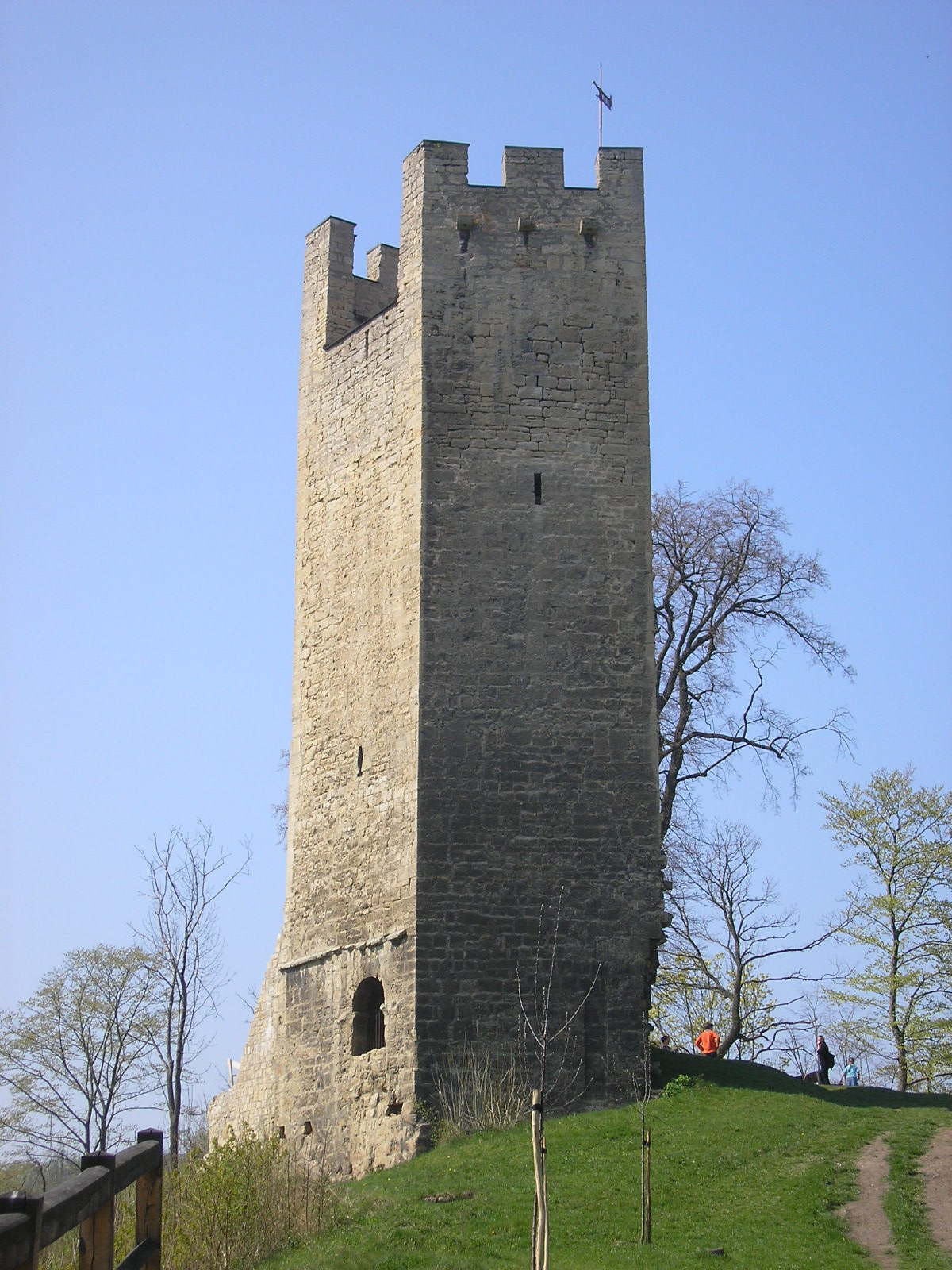 Der Turm der Burgruine Tautenburg (Thüringen).